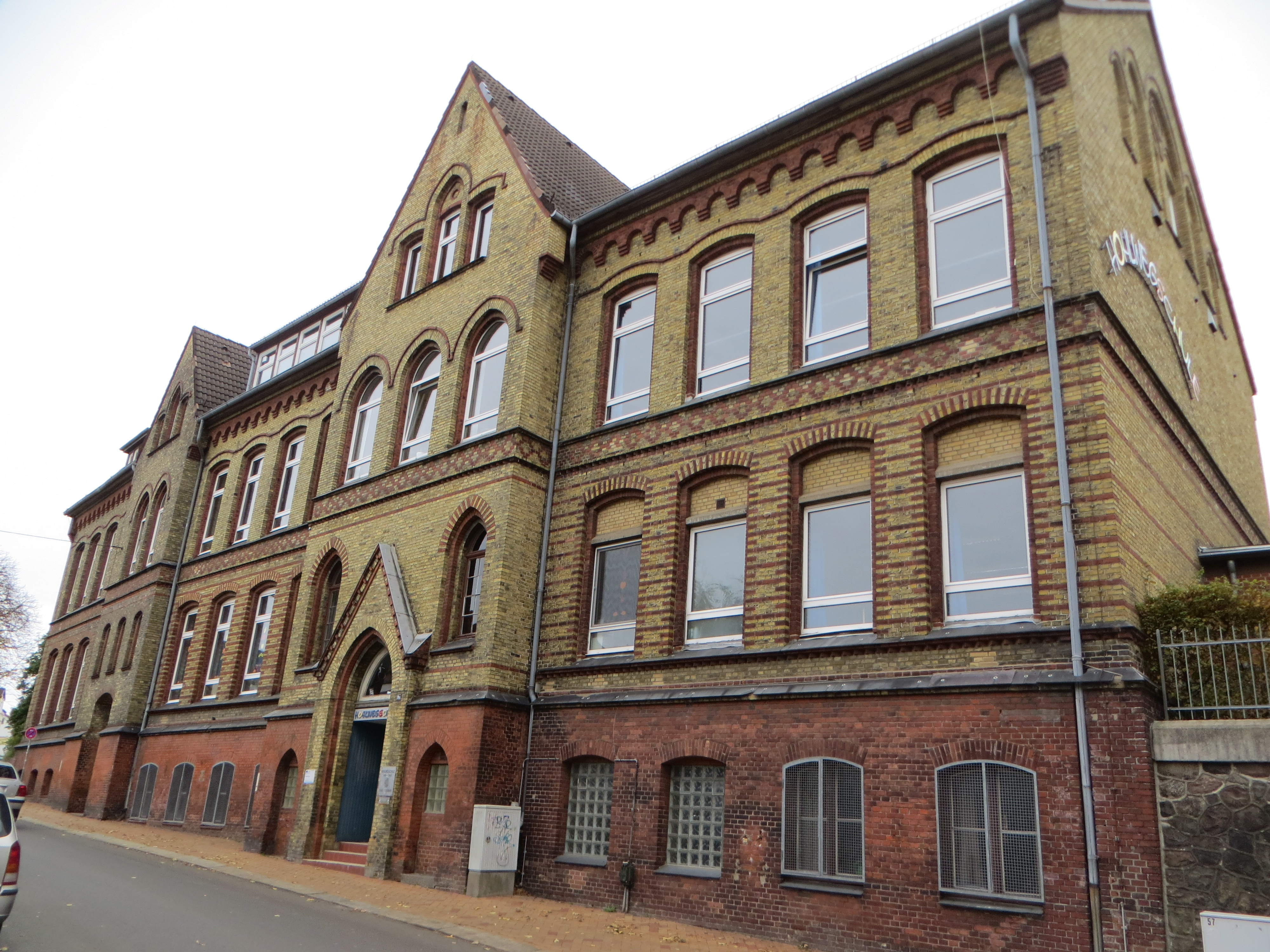 Hohlwegschule (Flensburg 2013), Bild 02